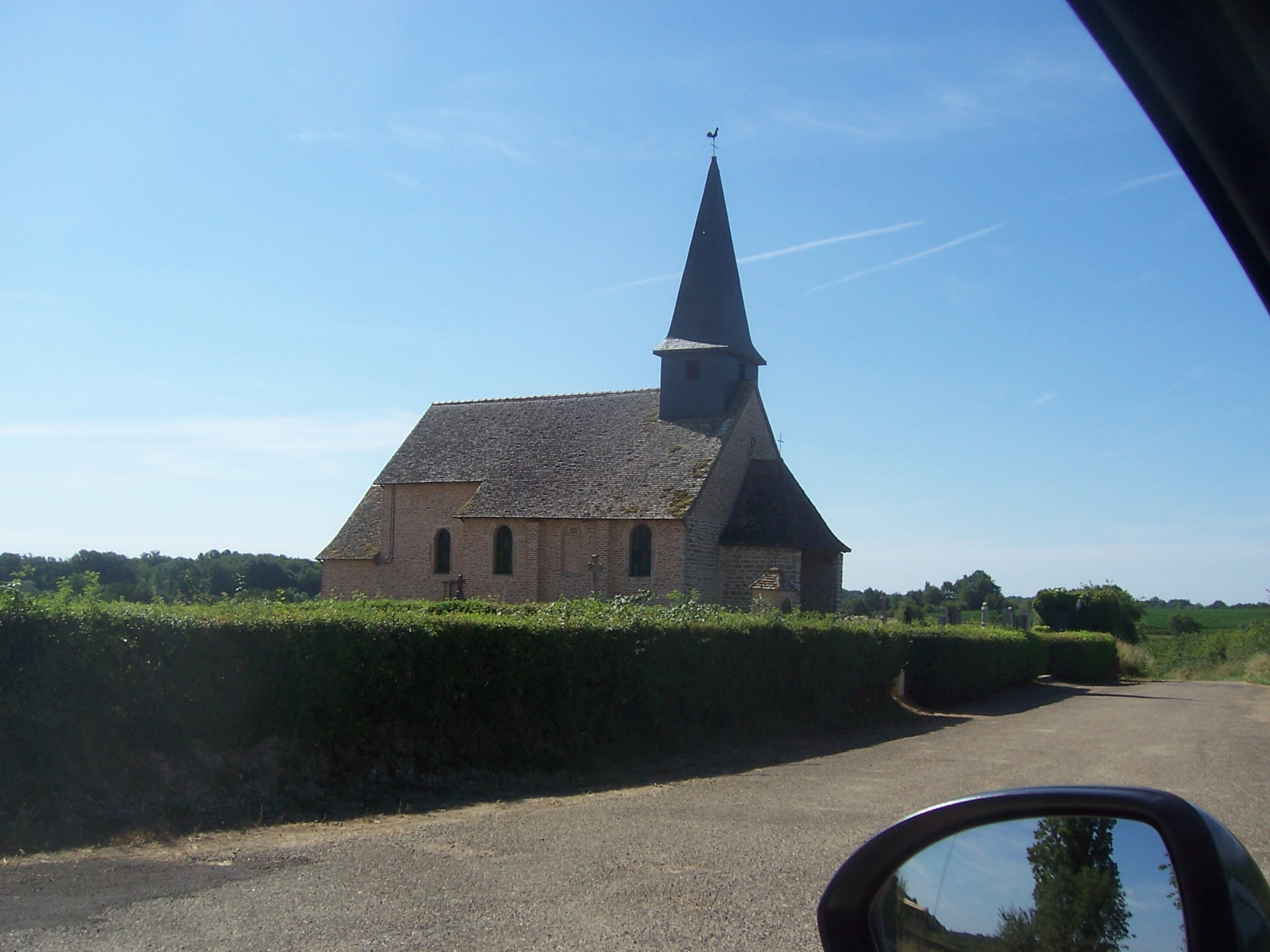 Eglise de Saint-André-en-Bresse